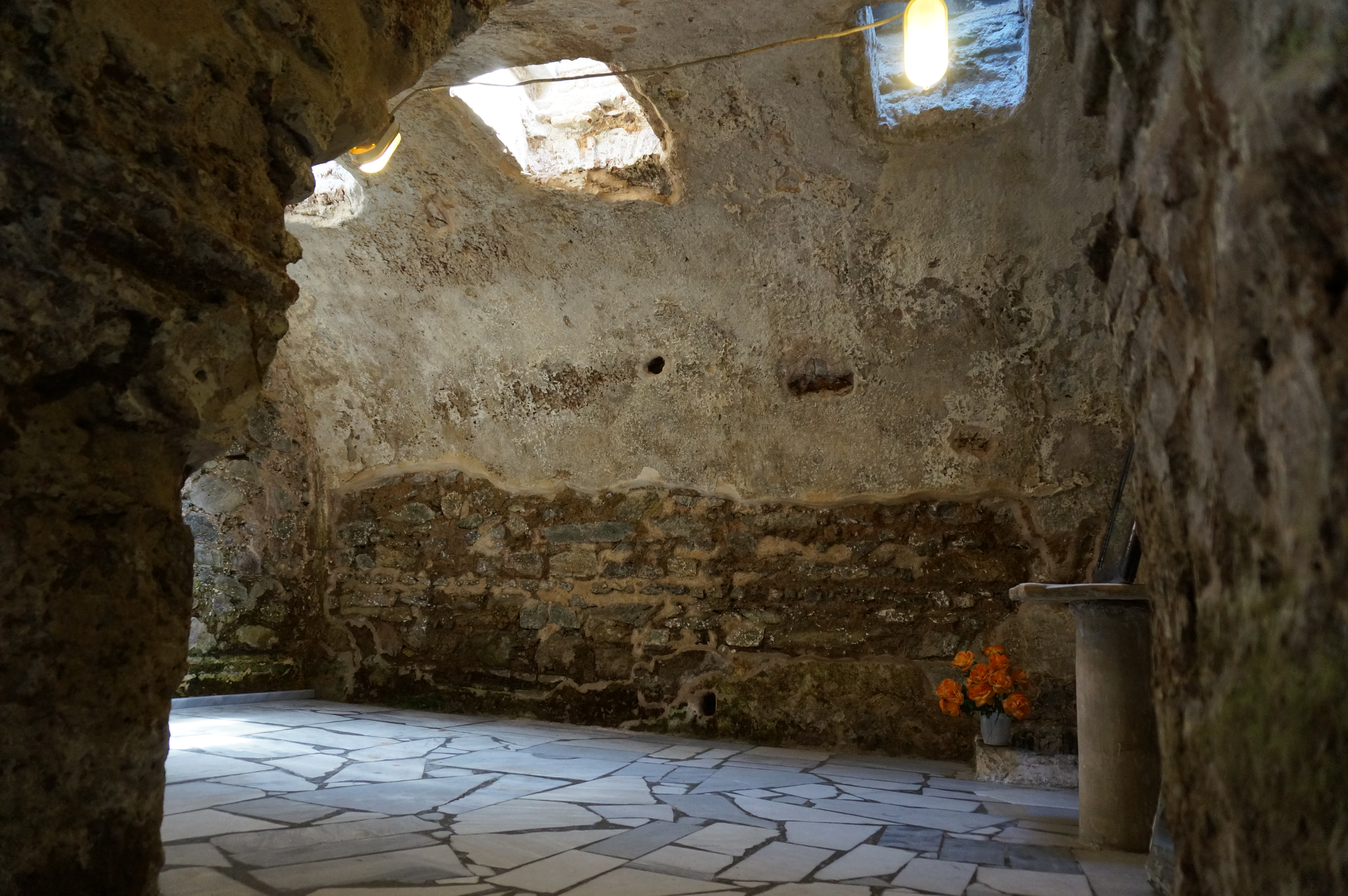 Vue des catacombes de Salonique.